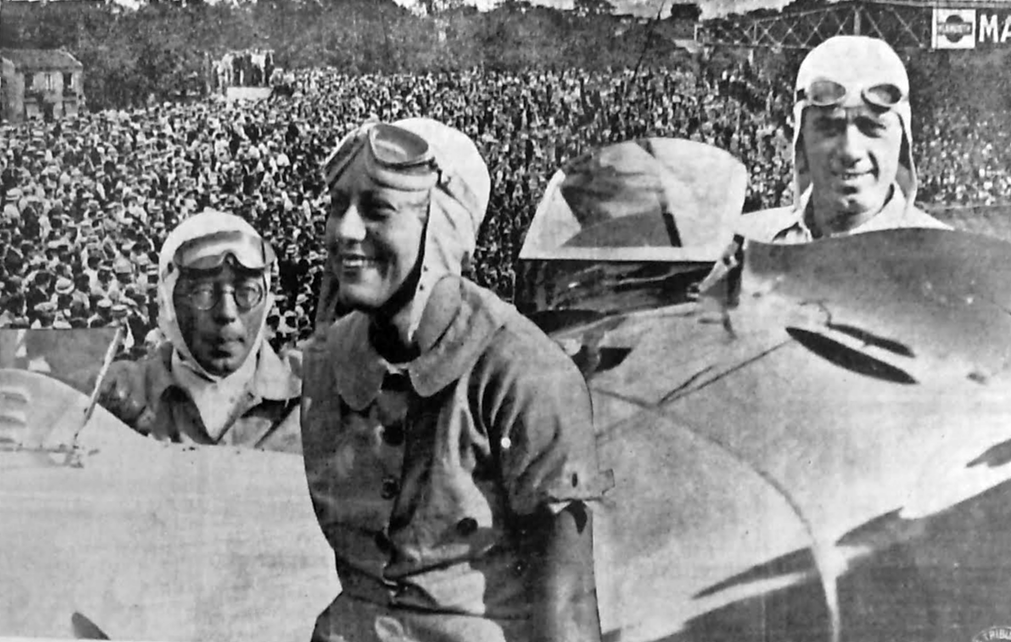 Fotomontagem com os pilotos (da esquerda para a direita) Manuel de Teffé (brasileiro), Hellé Nice (francesa) e Pintacuda (argentino), quando em São Paulo para o primeiro GP daquela cidade em julho de 1936, em foto publicada por A Tribuna.